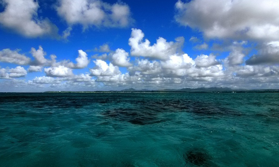 Blick vom Meer auf Mauritius, aufgenommen im Juni 2006 mit einer Canon 30D, Belichtungszeit 1/160sec, Blende 9.0, ISO100